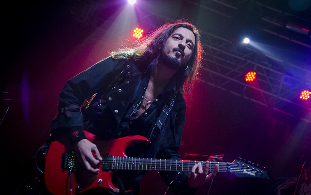 A Banda de Metal Sinfônico Therion apresenta-se em São Paulo, Brasil.